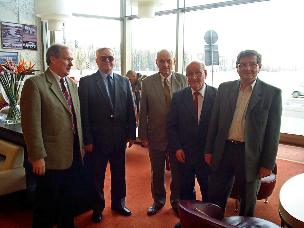 Grupa polskich działaczy i sędziów szachowych podczas obchodów 80-lecia Polskiego Związku Szachowego, Warszawa 27.02.2007.Od lewej: ?, Stanisław Kornasiewicz, Jan Górski, Zygmunt Ryll i Ulrich Jahr.